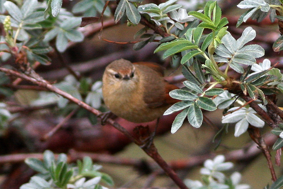 Yavi to St Victoria to Yavi